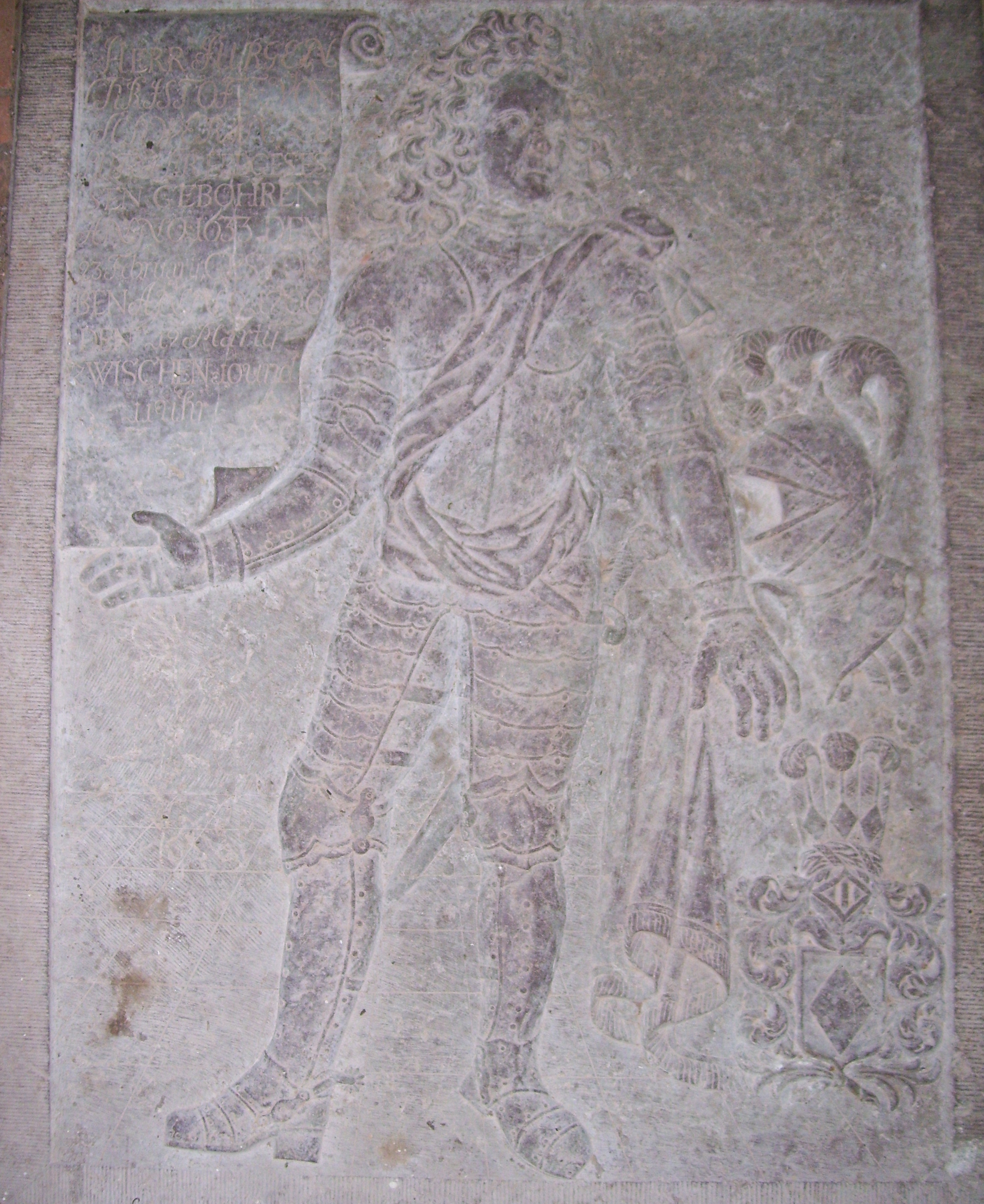 Kirche Putzar, Grabplatte des Jürgen Christoph von Schwerin